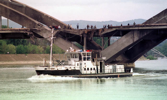 Нови Сад 1999. године. Нато бомбардовање СР Југославиа. Жежељев мост свакодневно су погађале ракете типа Томахавк.